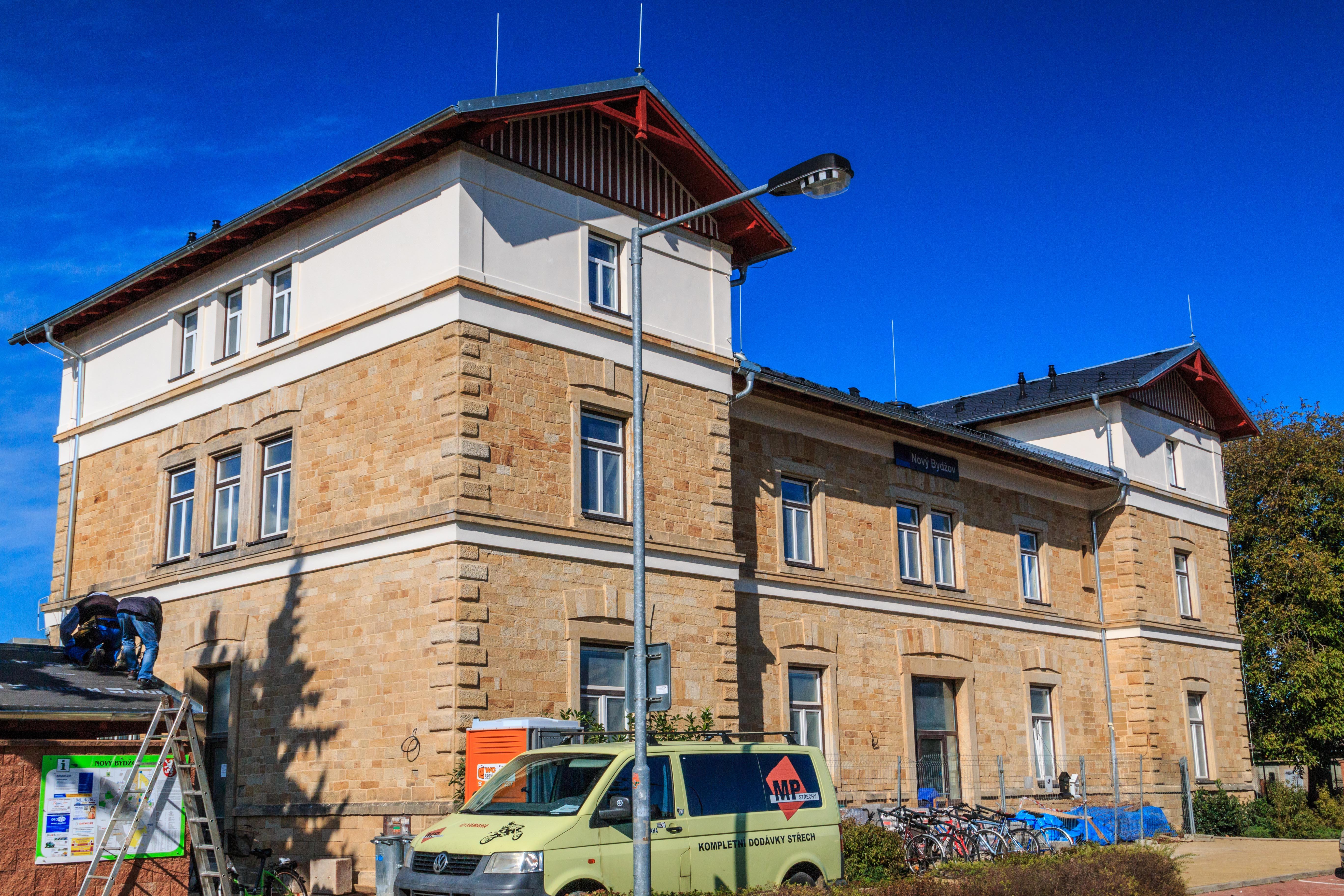 Dr. M. Horákové (Nový Bydžov)